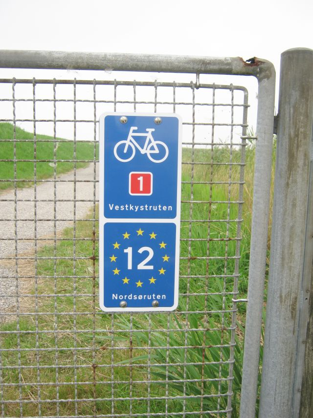 Ausschilderung der vestkystruten/ EuroVelo 12 in Vesterende-Ballum, Sönderjylland.